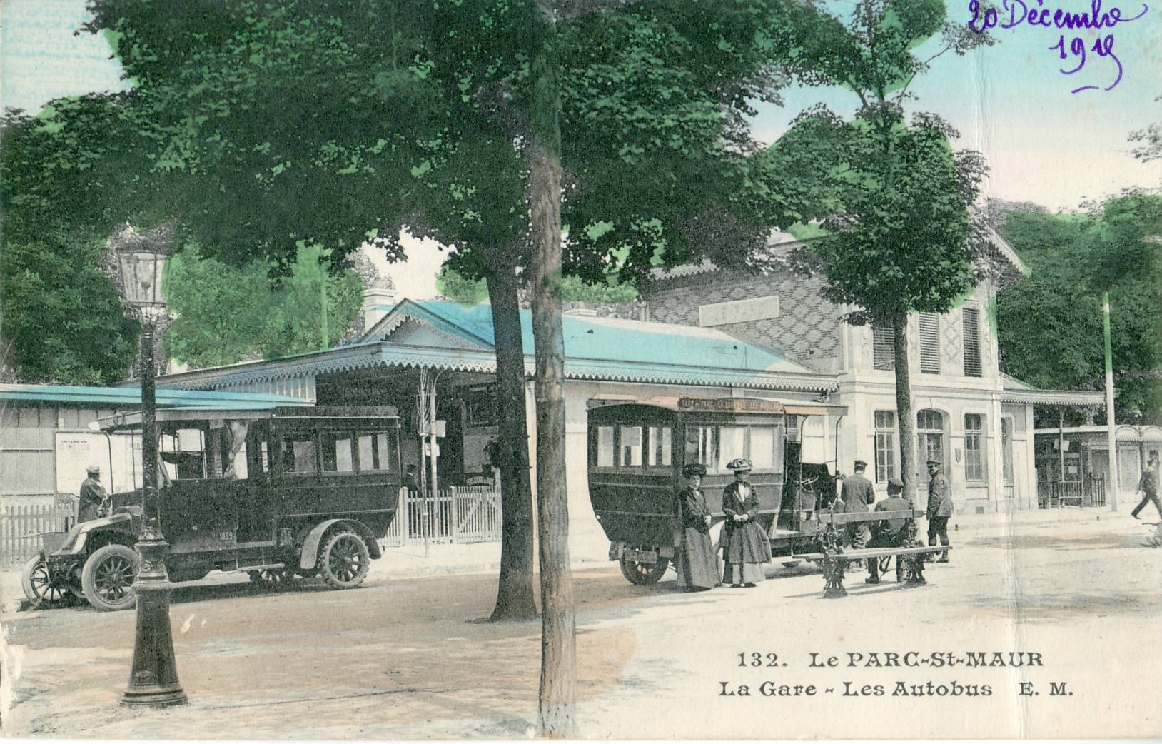 Carte postale ancienne éditée par EM, n°132 LE PARC-ST-MAUR - La Gare, les autobus.